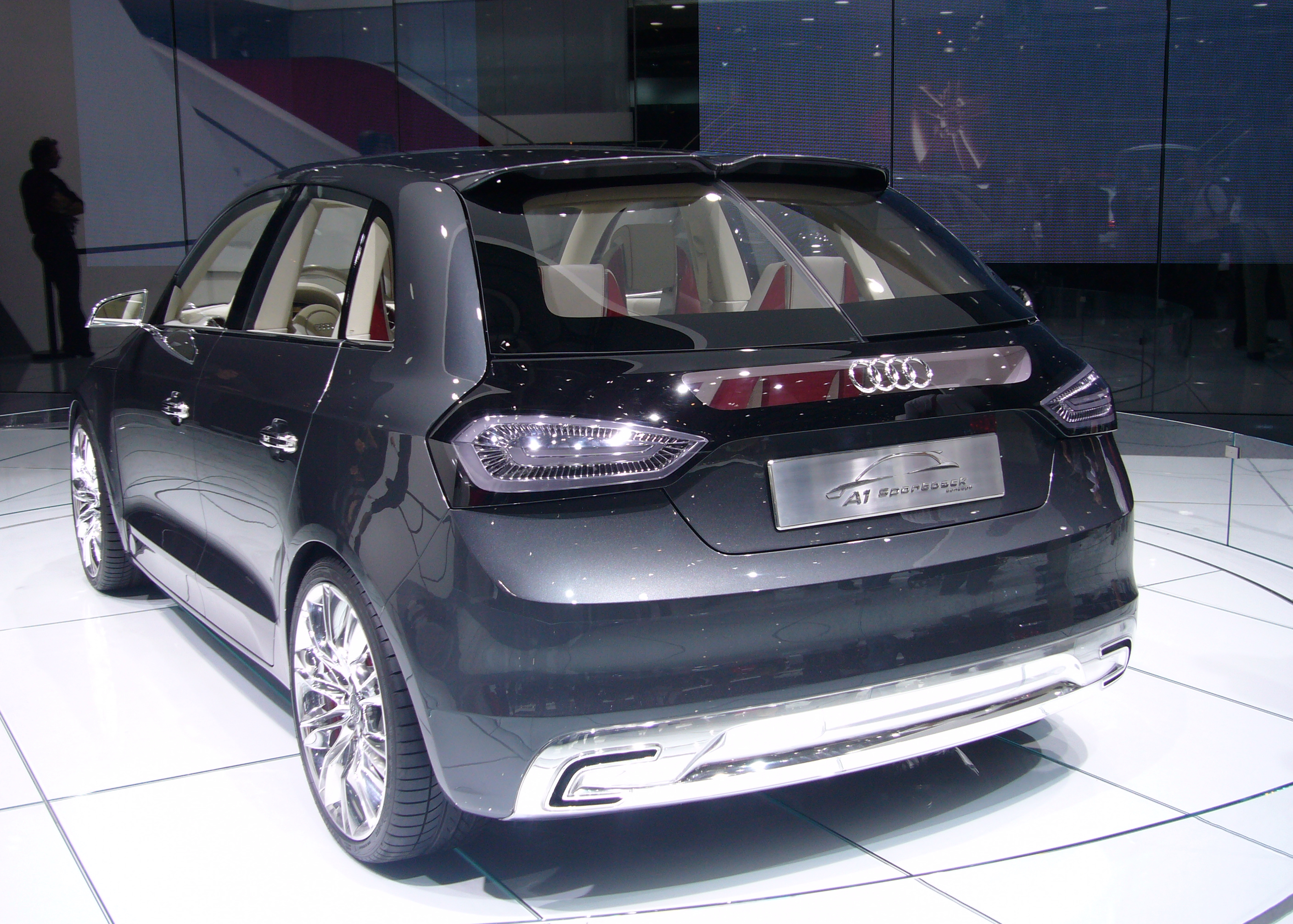 Mondial de l'Automobile Paris 2008